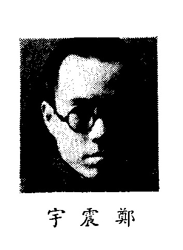 中文（中国大陆）: 制憲國民大會代表